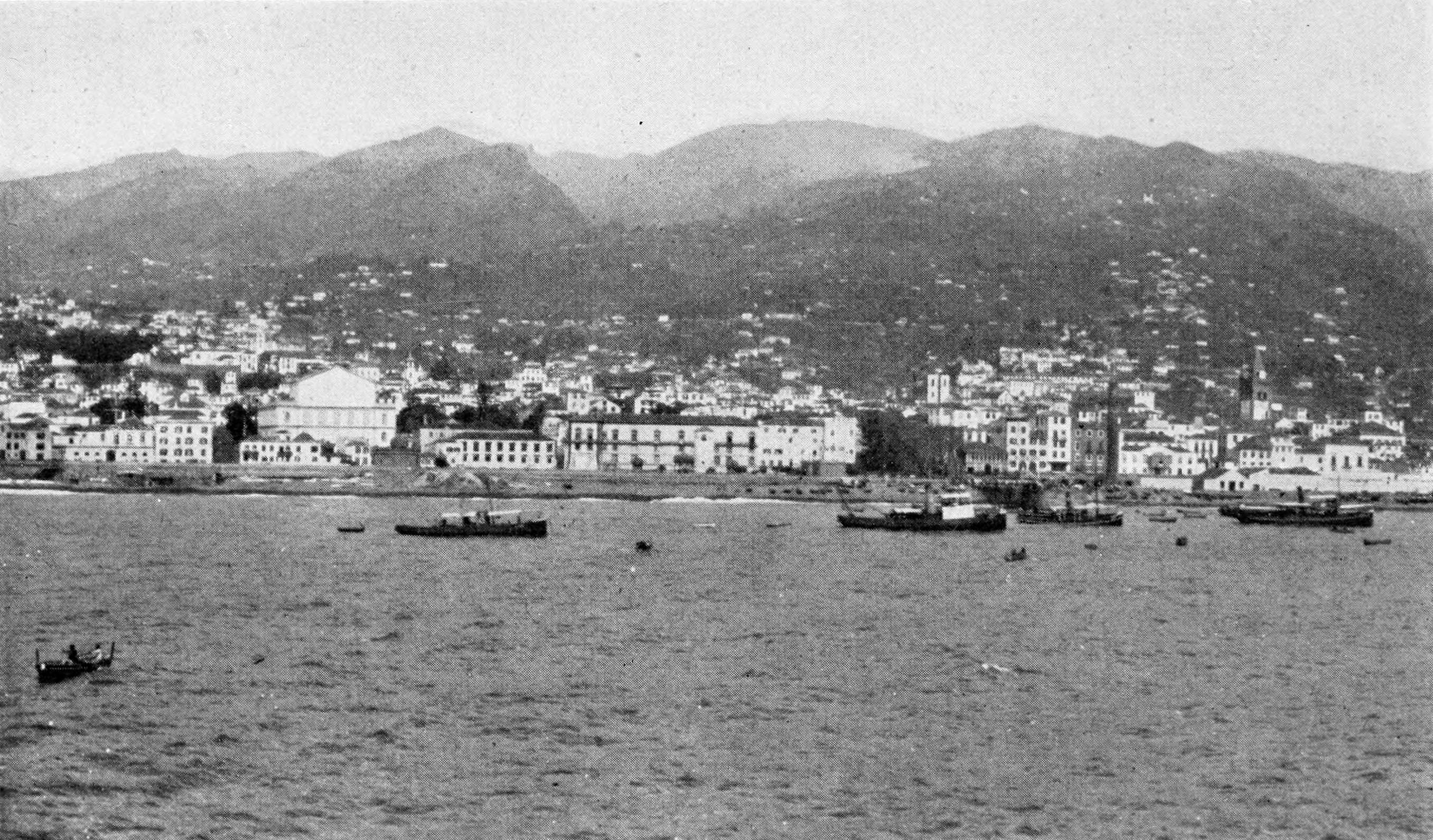 Funchal, Portugal